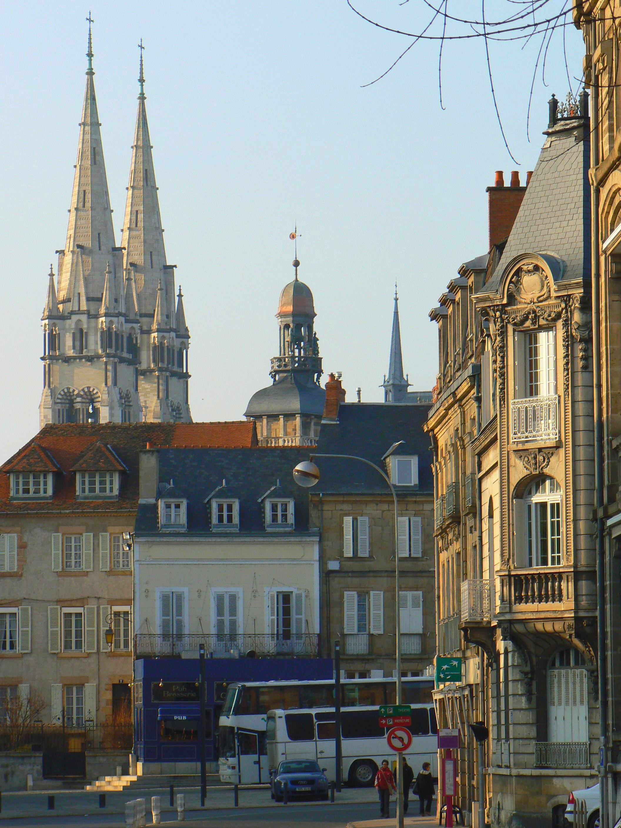 Vue sur la cathédrale, le Jacquemart, et la place devant le théâtre depuis le boulevard adjacent.